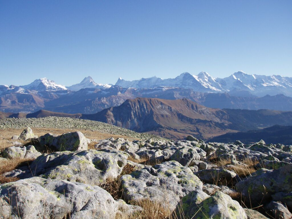 Hauptgipfel der Berner Alpen, fotografiert vom Hohgant. Von links nach rechts: Wetterhorn, Schreckhorn, Finsteraarhorn, Gross Fiescherhorn, Eiger, Mönch und Jungfrau.